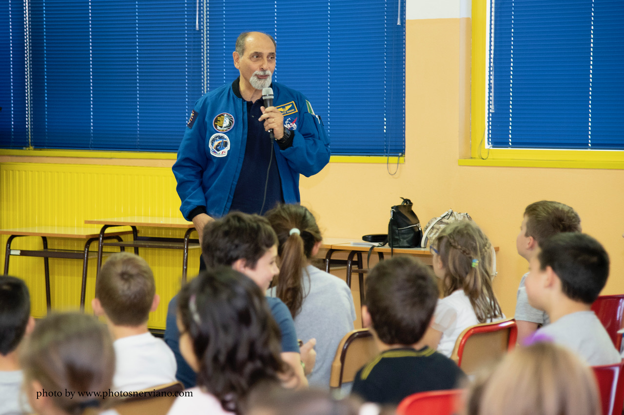 Guidoni incontra gli studenti della scuola elementare San Giorgio su Legnano